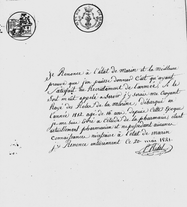 Lettre sur papier timbré de renoncement à toute profession maritime par un pharmacien en 1821. Il sort ainsi de l'inscription maritime.